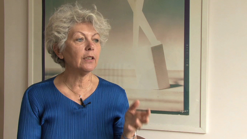 Marielle Issartel lors d'un entretien réalisé par le site culturopoing.fr